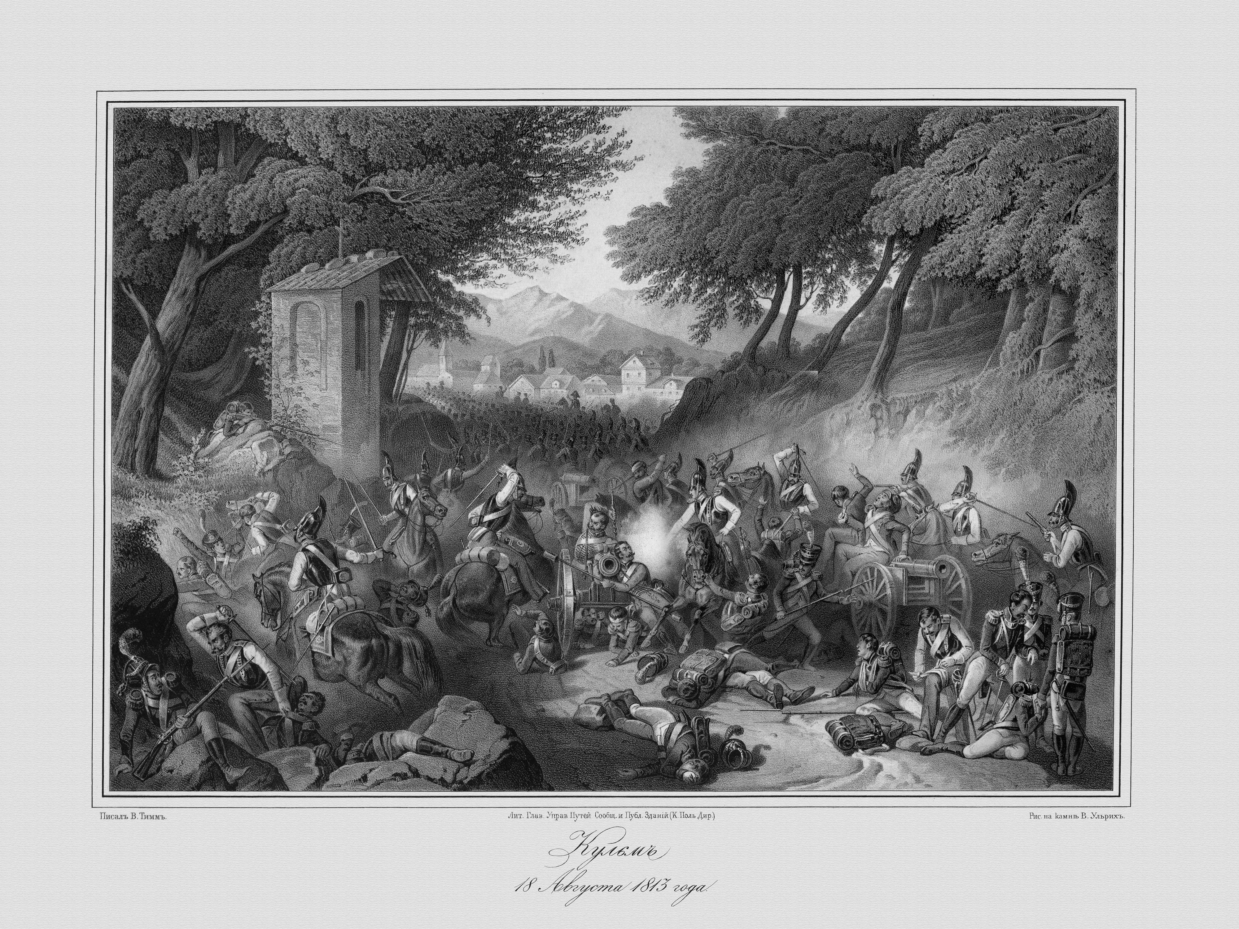 Bataille de Kulm, 30 aout 1813